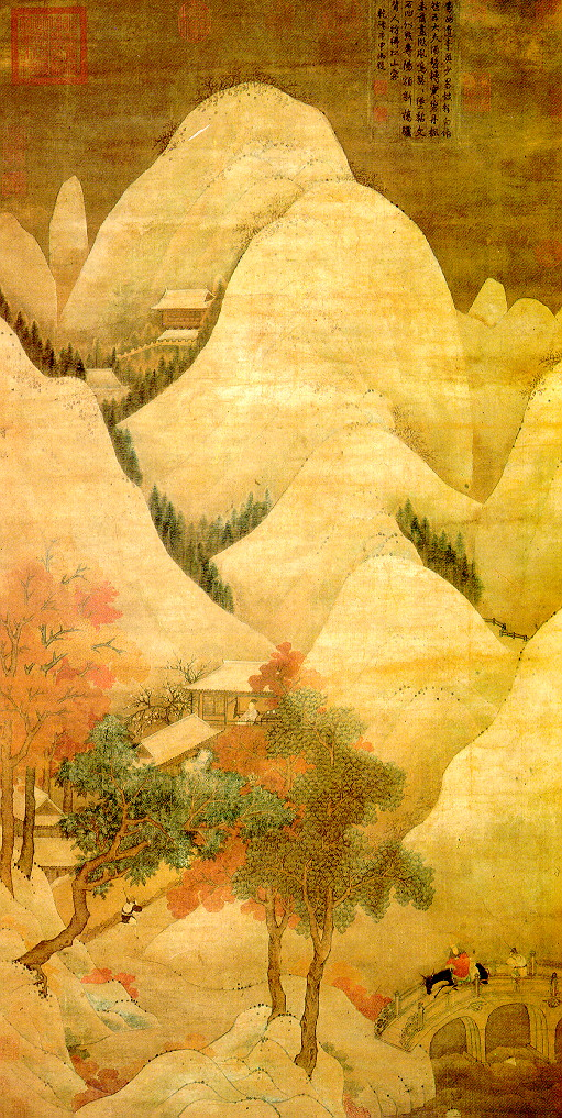 雪山紅樹圖，南北朝張僧繇所繪。